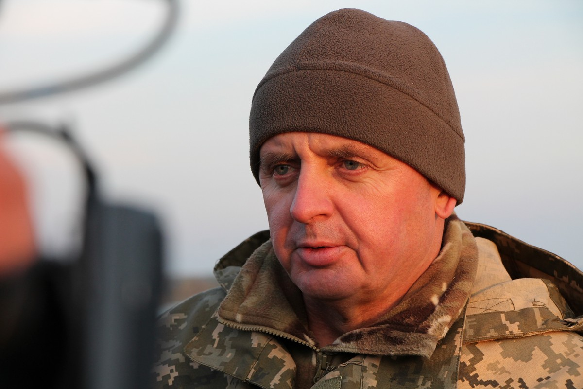 Наведення понтонно-мостової переправи через річку Дніпро відбулось в рамках стратегічних командно-штабних навчань “Рубіж – 2016”. В заході взяли участь понад 500 військовослужбовців та близько 300 одиниць військової техніки. Силами понтонно-мостового полку інженерних військ ЗС України через річку Дніпро під Херсоном було наведено понтонно-мостову переправу довжиною 560 м. За словами командувача інженерних військ ЗС України полковника Юрія Лукашика, наведення понтонно-мостової переправи такої протяжності відбулось за роки Незалежності України вперше. За діями понтонерів спостерігав начальник Генерального штабу – Головнокомандувач Збройних Сил України генерал армії України Віктор Муженко. До відпрацювання завдання були залучені понтонери, розвідники-водолази та підрозділи військ РХБ захисту. Попри сильний вітер та стрімку течію, понтонери протягом кількох годин навели через річку Дніпро понтонний міст по якому почала пересування наземна техніка. Аби приховати переправу від умовного противника, підрозділи РХБ захисту встановили димову завісу. Генерал армії України Віктор Муженко високо оцінив дії понтонерів. – Час наведення цієї переправи склав 2 години, в той час як подібна переправа наводиться протягом 3-4 годин. Таким чином норматив було перекрито в півтора-два рази, що дає нам можливість оцінювати дії цих підрозділів на “відмінно”, – зазначив Головнокомандувач Збройних Сил України. Крім представників вищого командування Збройних Сил України за діями понтонерів спостерігали голова Херсонської обласної державної адміністрації Андрій Гордєєв, місцеві мешканці та представники національних та регіональних ЗМІ. Фото: Ярослав Чепурний